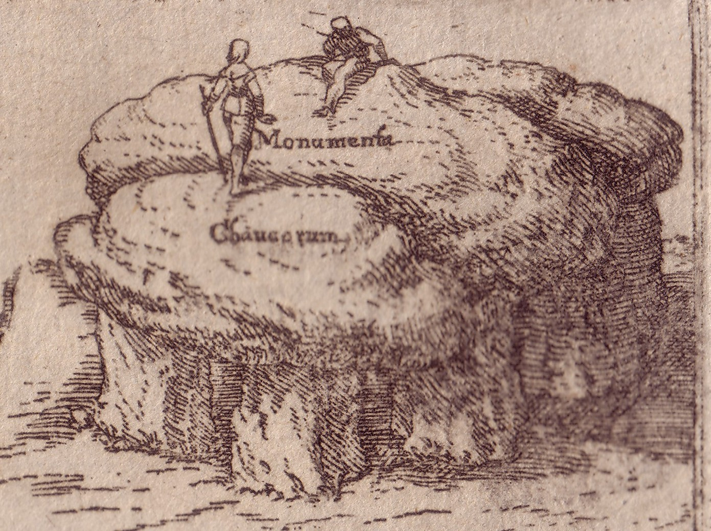 älteste Darstellung des Großsteingrabs Bülzenbett nördlich der Pipinsburg